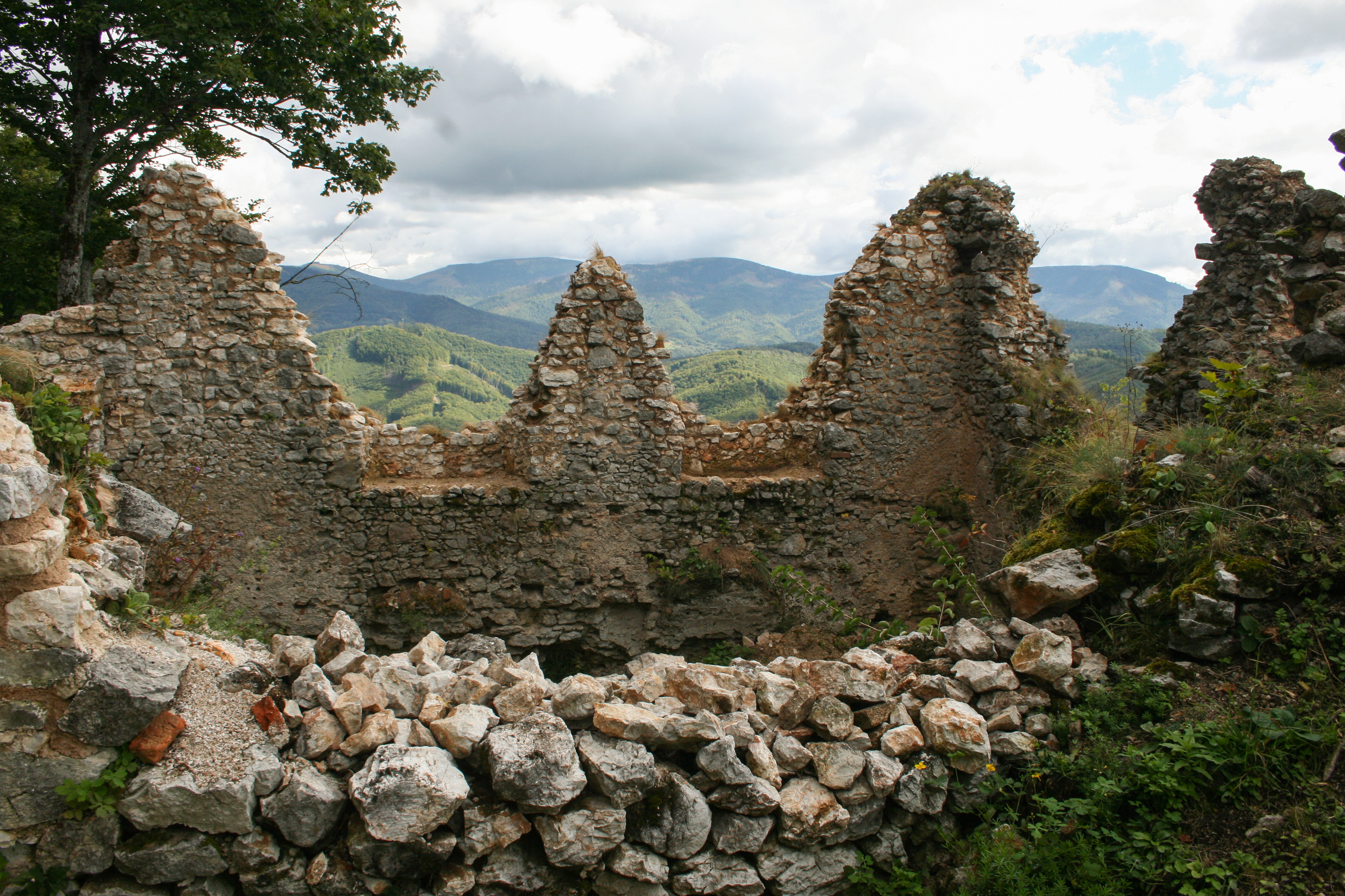 Zvyšky Muránskeho hradu.